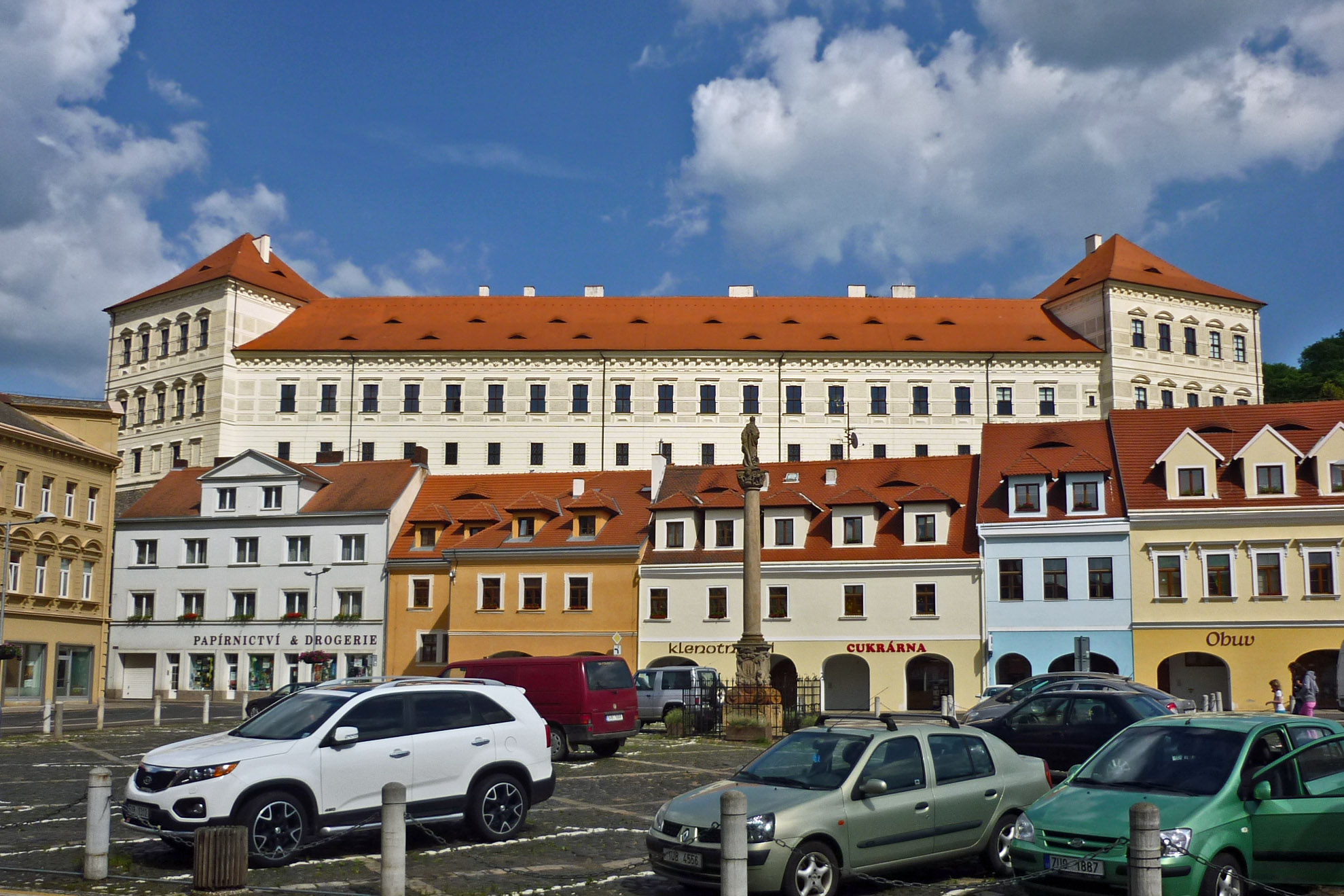 Ringplatz mit Lobkowicz-Schloss in Bilin (Bílina) in Nordböhmen